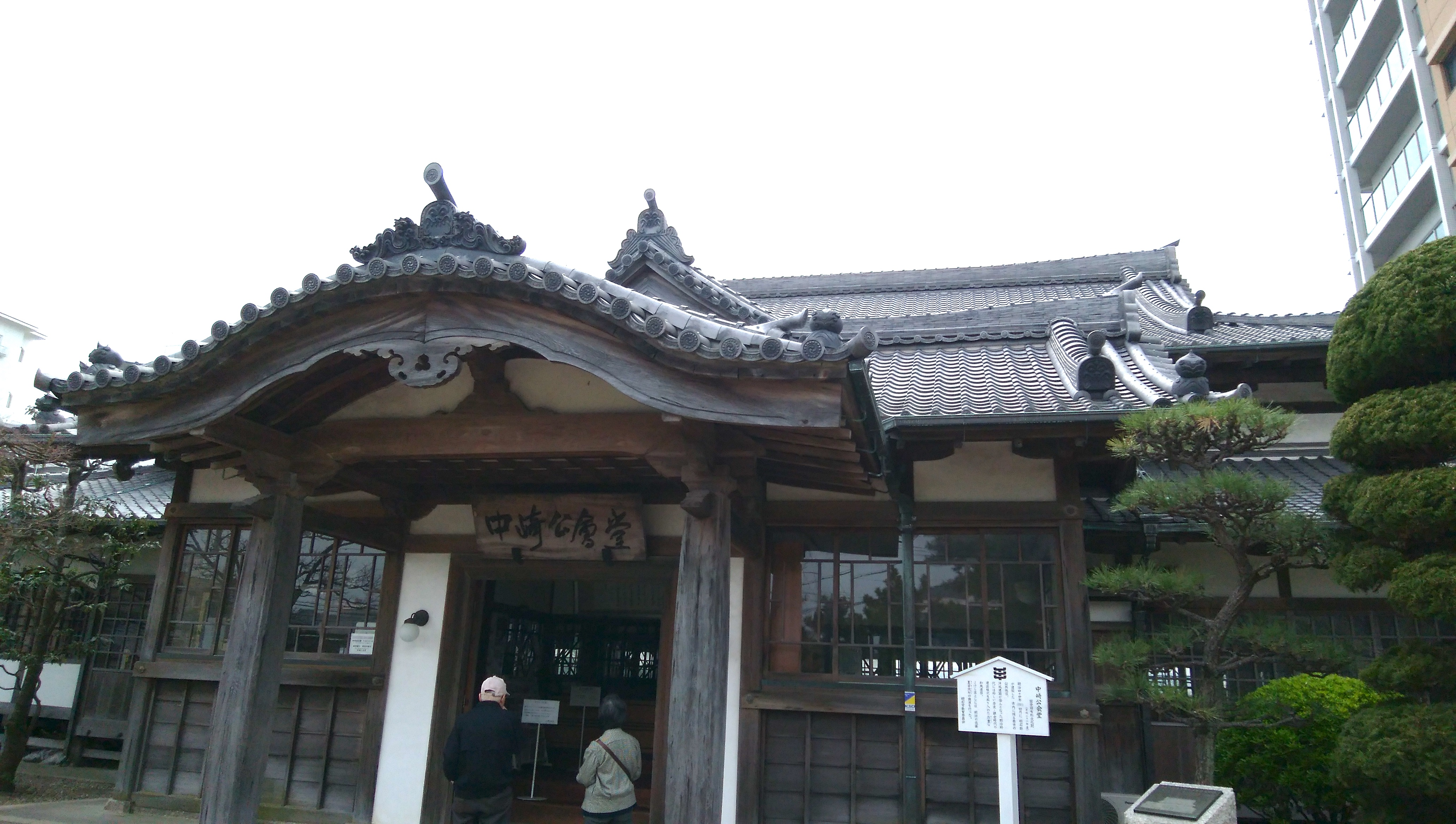 明石市にある中崎公会堂（右正面）